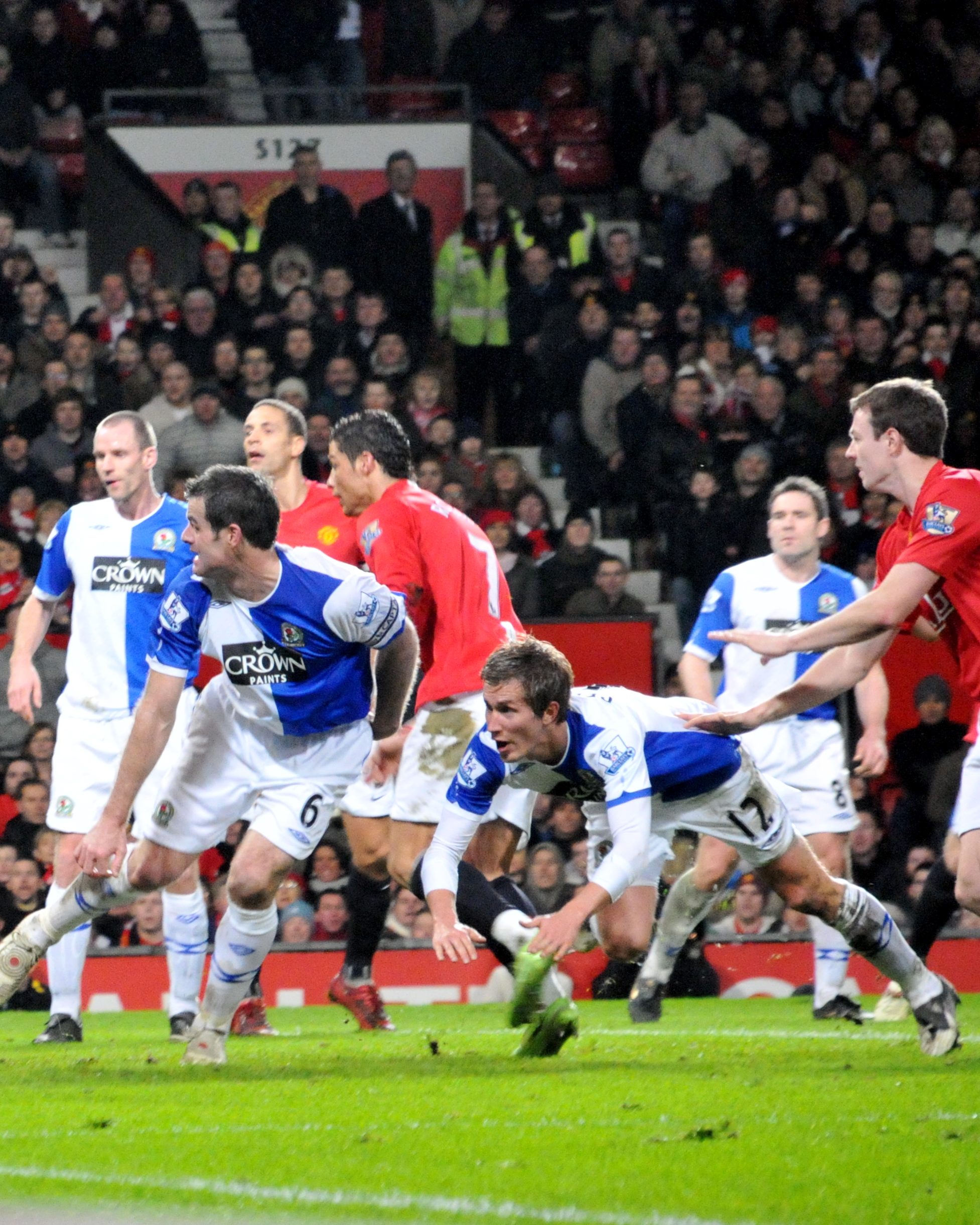 Diving header